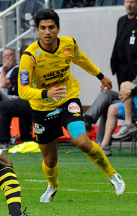 Mahmut Özen